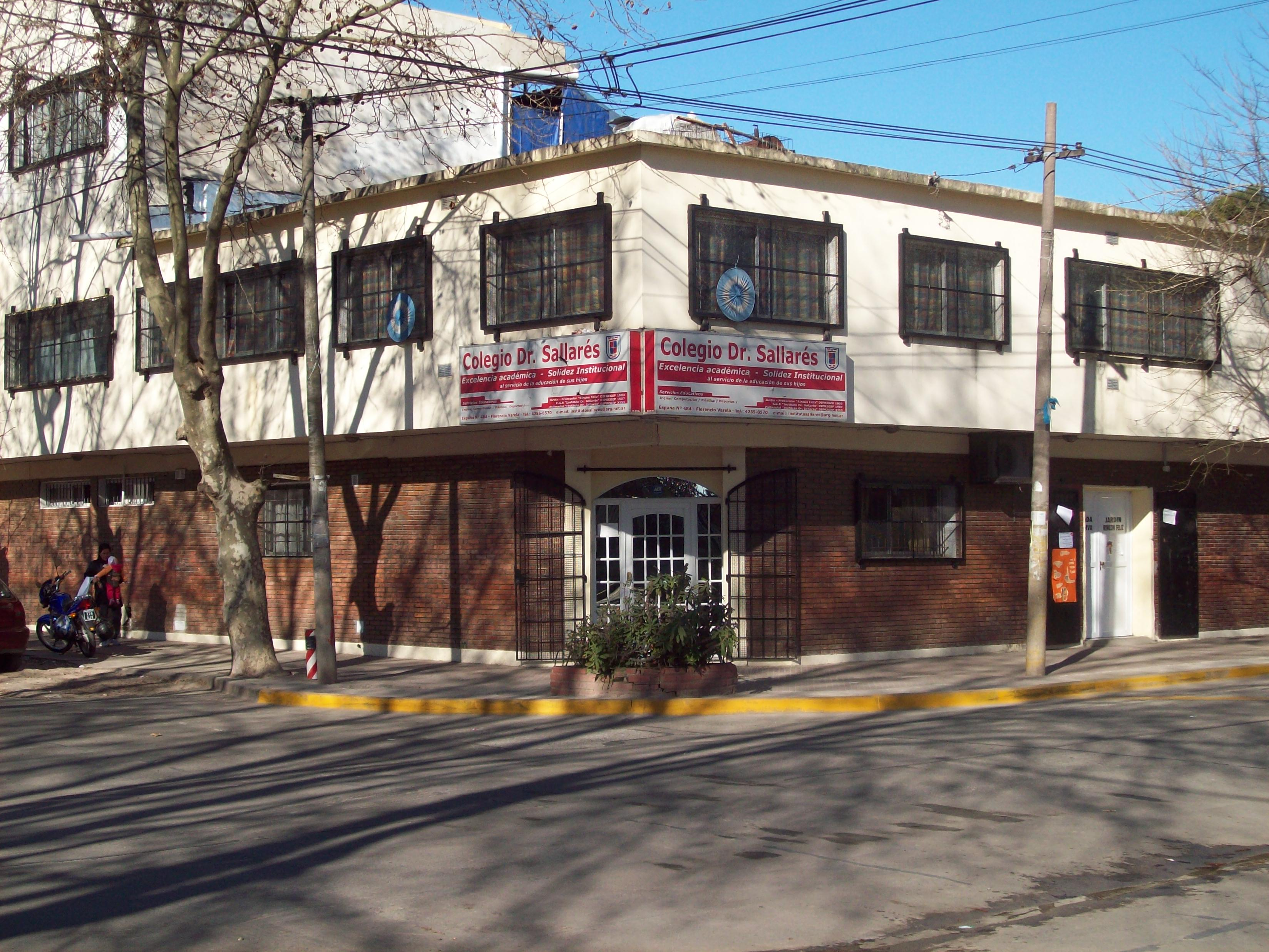 Foto del frente del colegio doctor Salvador Sallarés de Florencio Varela.